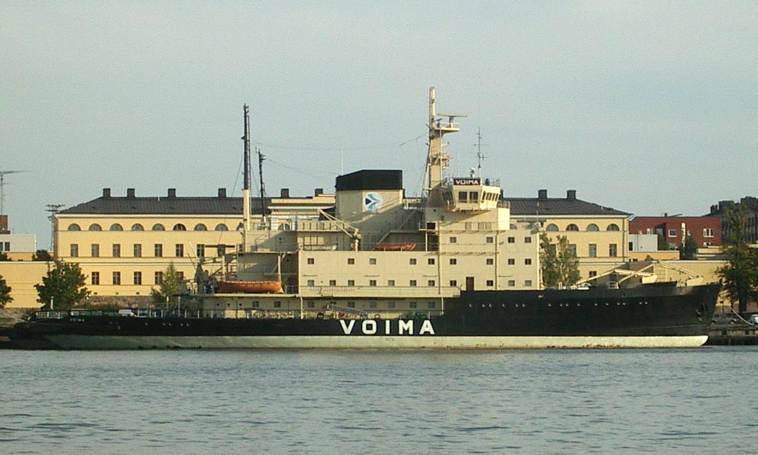 Jäänmurtaja Voima laiturissa Katajanokalla kesällä 2006. Kuvattu Tervasaaresta.